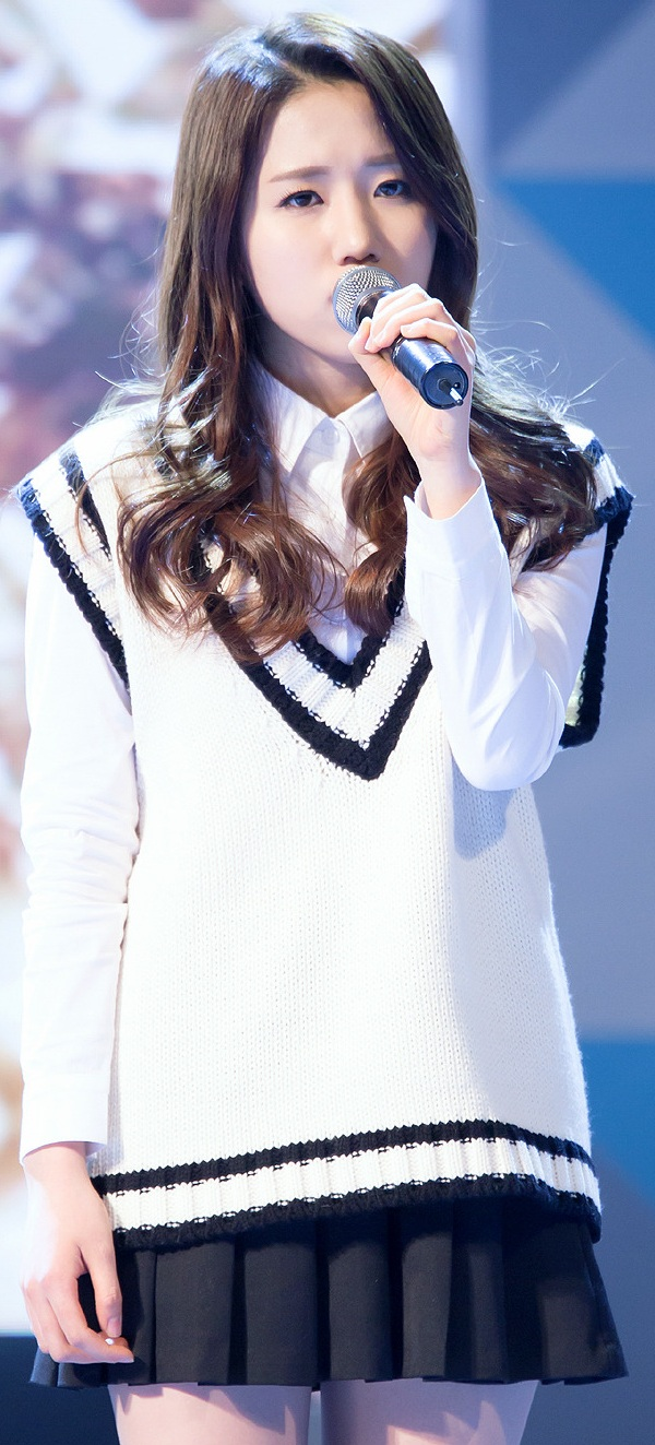 러블리즈 JIN